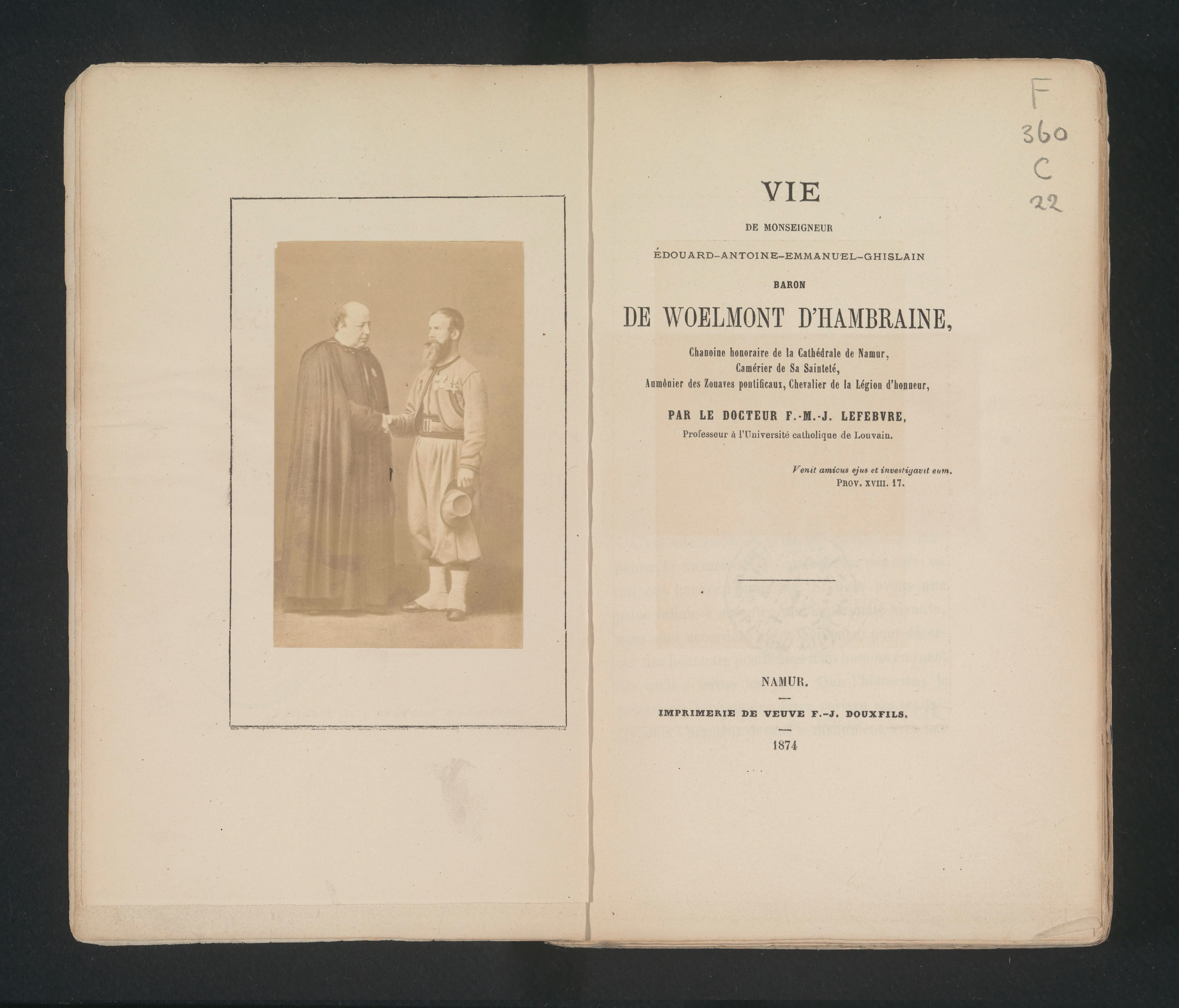 IdentificatieTitel(s): Bisschop Edouard Woelmont schudt de hand van een soldaatObjecttype: foto bladzijde Objectnummer: RP-F-2001-7-1334-1VervaardigingVervaardiger: fotograaf: anoniemDatering: ca. 1869 - in of voor 1874Materiaal: fotopapier Techniek: albuminedrukAfmetingen: foto: h 89 mm × b 55 mmToelichtingFoto tegenover titelpagina.OnderwerpWat: historical personsarchbishop, bishop, etc. (Roman Catholic)private soldierWie: Edouard WoelmontVerwerving en rechtenCredit line: Aankoop met steun van de Mondriaan Stichting, het Prins Bernhard Cultuurfonds, het VSBfonds, het Paul Huf Fonds/Rijksmuseum Fonds en het Egbert KunstfondsVerwerving: aankoop 2001Copyright: Publiek domein